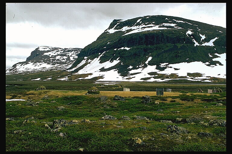 Sommarviste. Bilden troligen från början av 1960-talet.; Byggnadsverk; Fjällmiljö; Miljöer; Nomadnäring; Sameviste